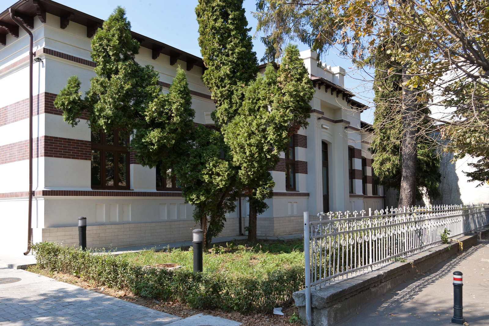 Fotografia prezinta fosta Scoala "Nicolopol", actualul Liceu de Arta - Corp B, de pe bd. Republicii 114.